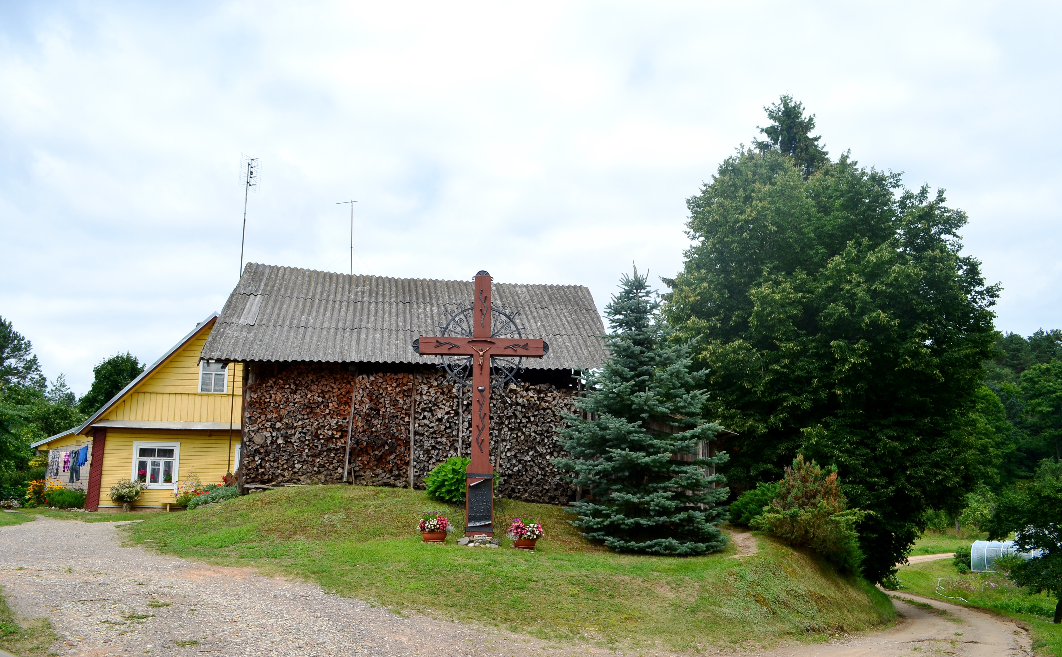 Salų (I) k., Ignalinos raj.